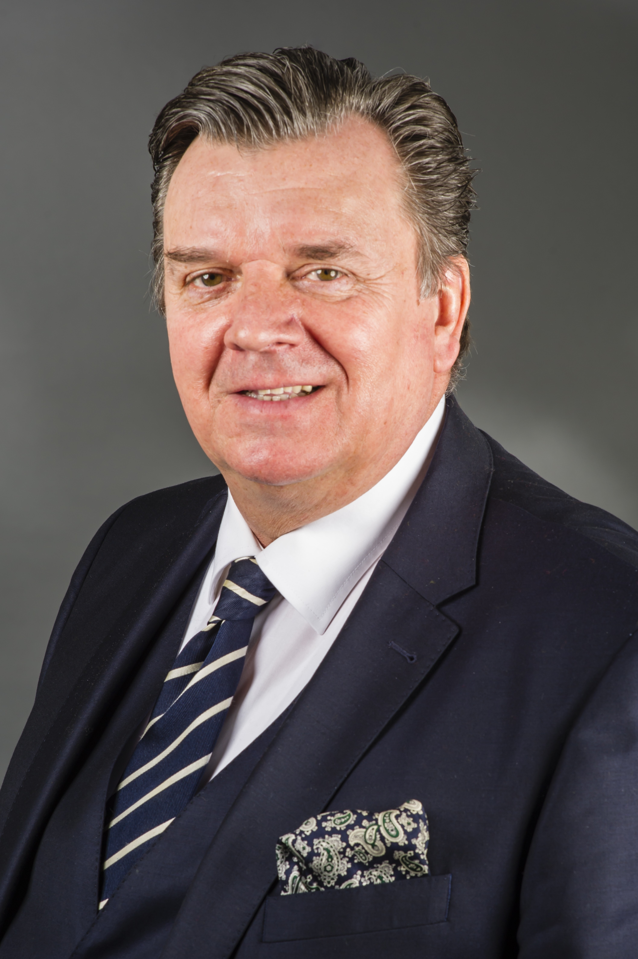 Uwe Dorendorf